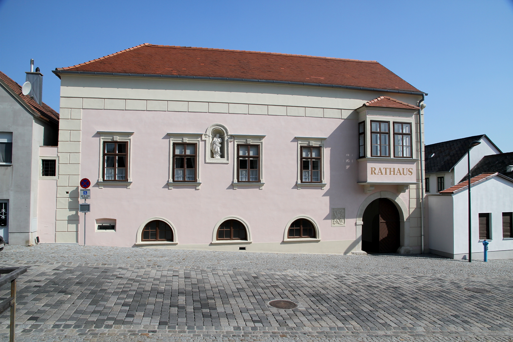 Das Rathaus in der burgenländischen Marktgemeinde Großhöflein.